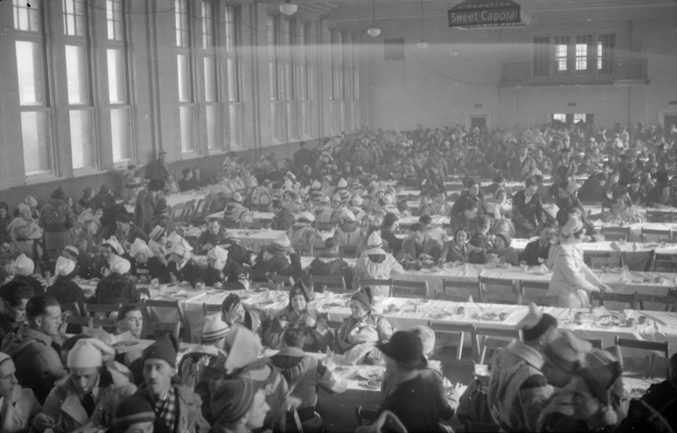 Lors d'une rencontre de clubs de raquetteurs organisée au Parc Lafontaine à Montréal, nous voyons une foule de raquetteurs en costume attablés le long de rangées de tables devant un repas chaud à l'intérieur du Marché Saint-Jacques, à l'angle des rues Amherst et Ontario Est dans le quartier Centre-Sud de Montréal.